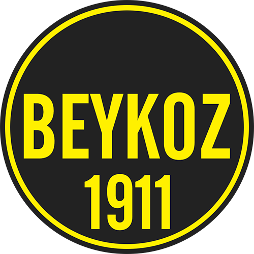 Beykozspor 1908'in eski logosu.